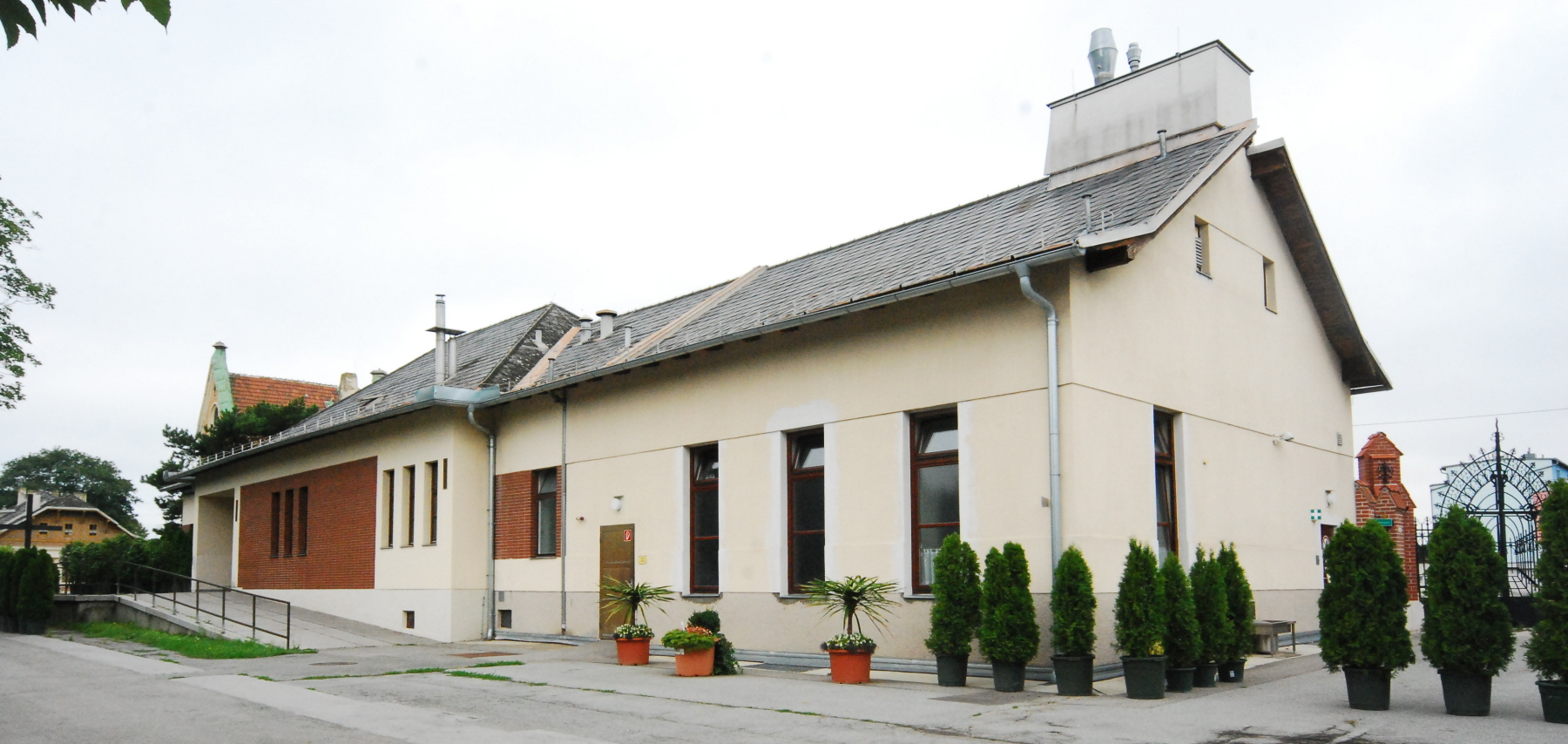 Aufbahrungshalle 2 auf dem Stammersdorfer Zentralfriedhof